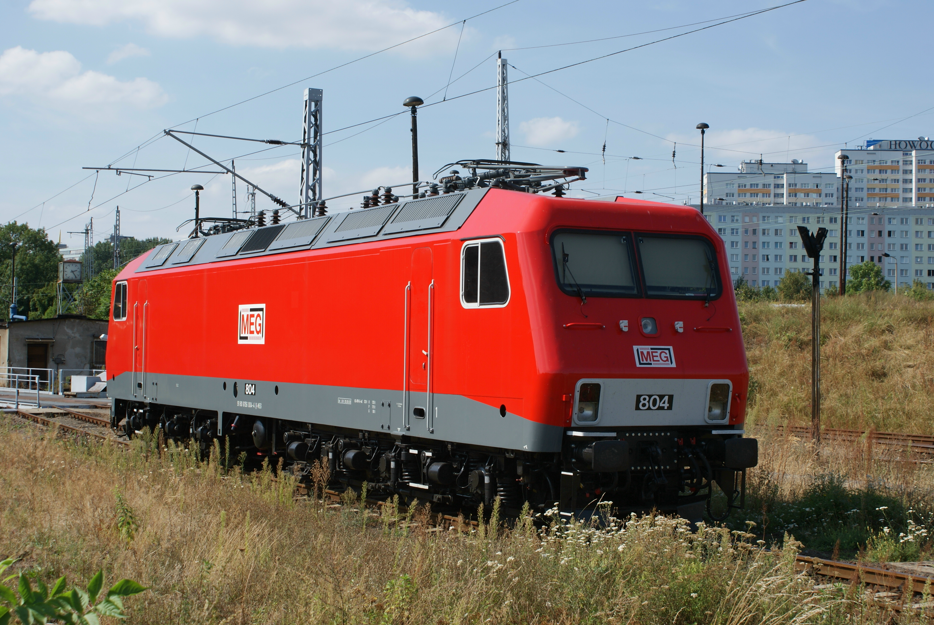 El-Lok der ehemaligen Baureihe 252 der DR im ehemaligen Bw Berlin-Lichtenberg